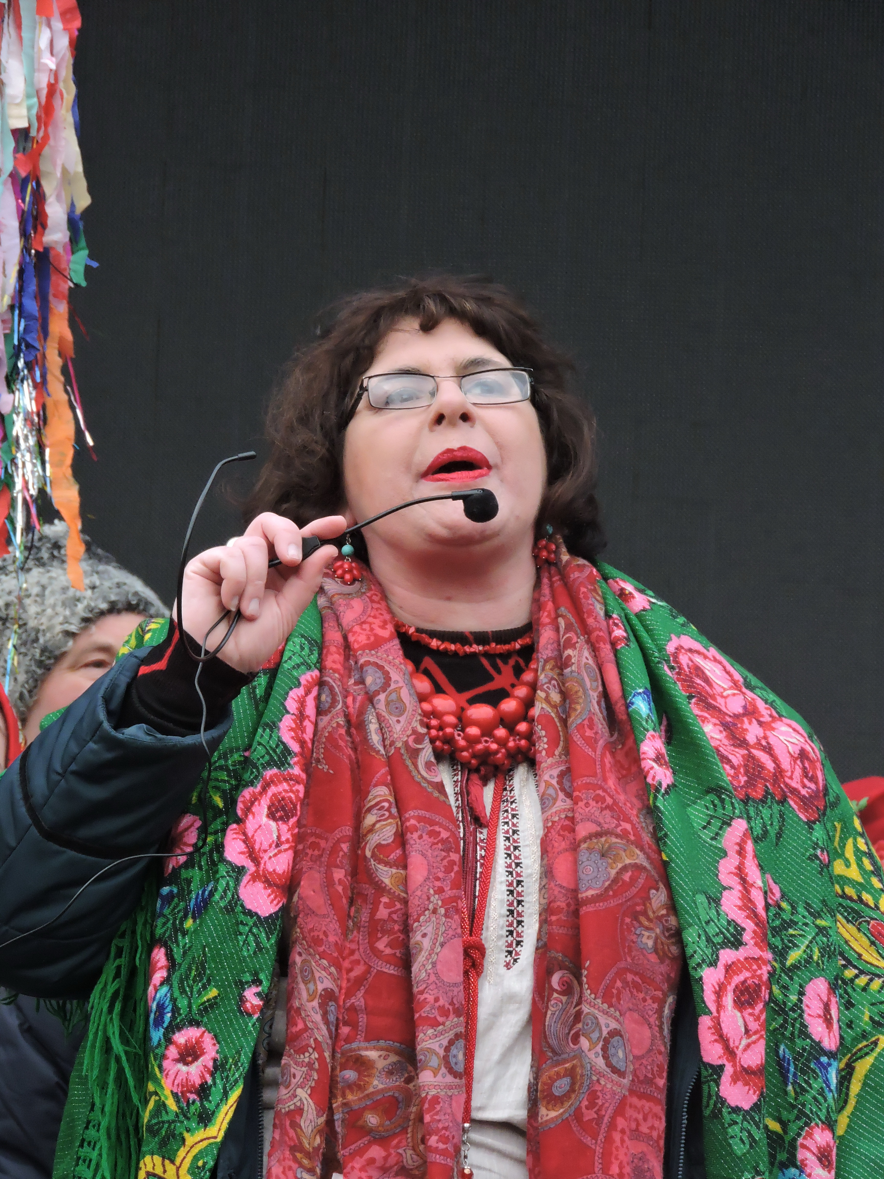 Церемонія відкриття «Вертеп-фесту 2020» на Центральній сцені фестивалю в Центральному парку культури і відпочинку імені Максима Горького в рамках .м. Харків, 12 січня 2020 року.Олена Рофе-Бекетова, директорка благодійного фонду «Харків з тобою», координаторка «Вертеп-фесту 2020».